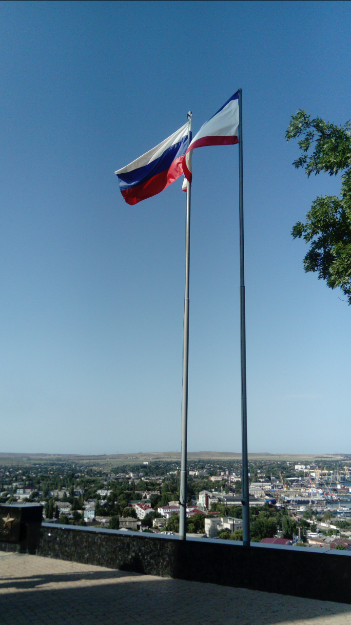 Флаги Российской Федерации и Республики Крым на горе Митридат